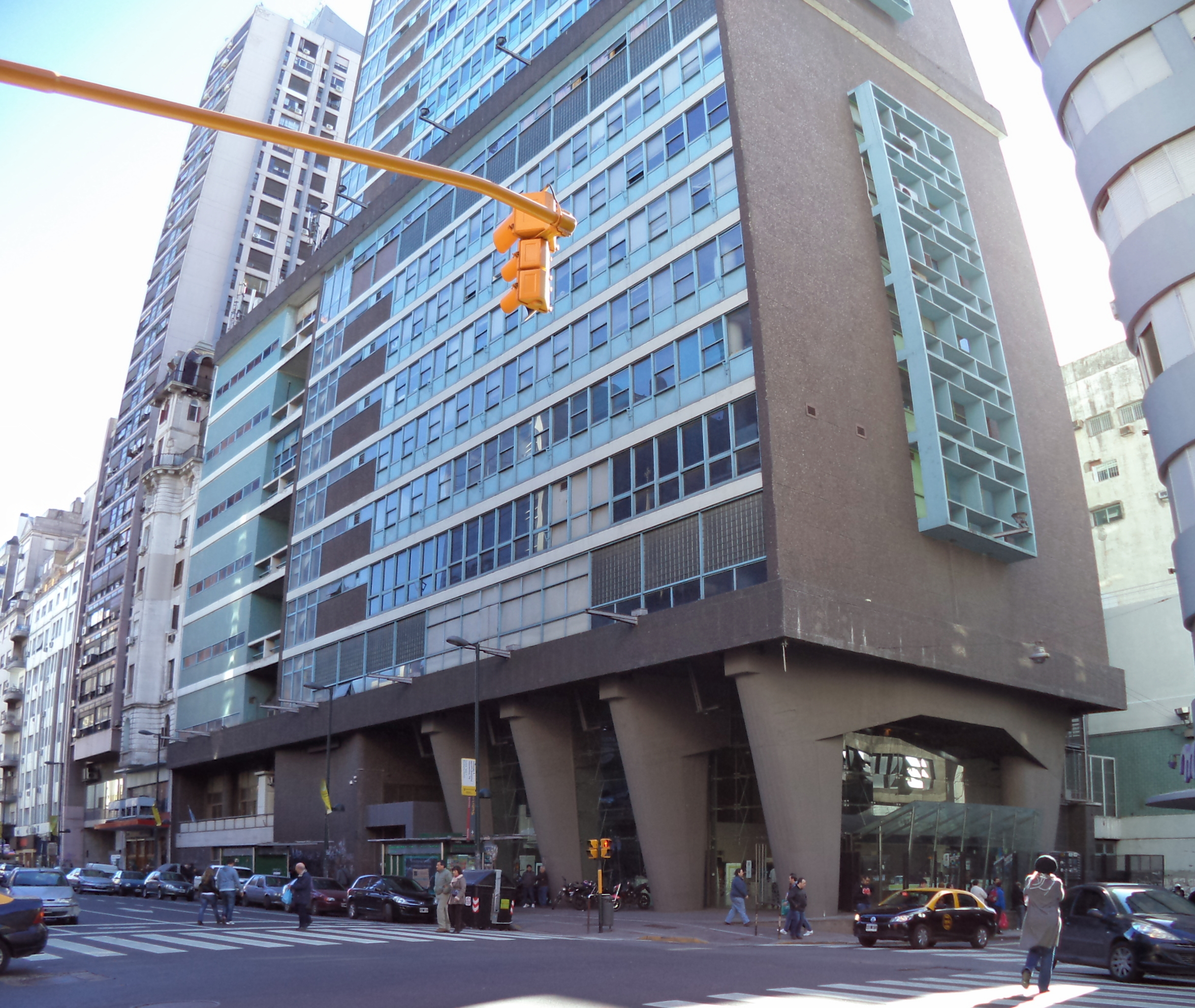 Edificio República, construido para ENTEL (hoy Telefónica) en Buenos Aires.